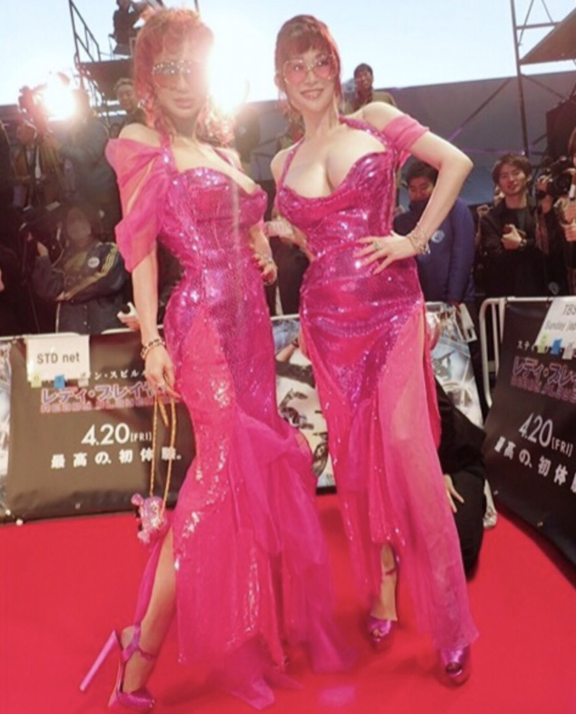 叶 姉妹, Kano Sisters